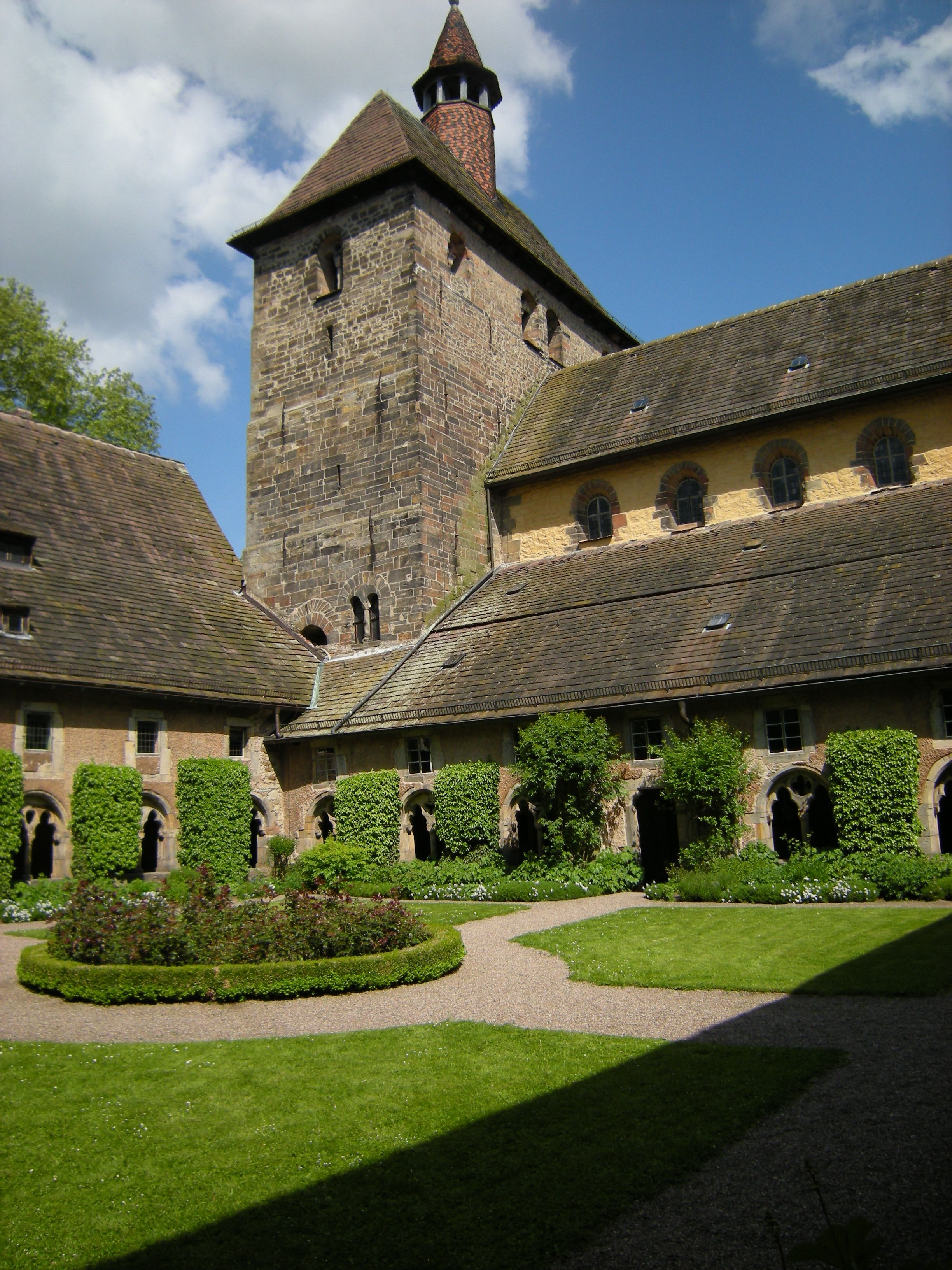 Hessisch Oldendorf - Stift Fischbeck Kirche Innenhof